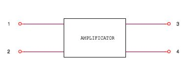 Schema electrica Amplicator